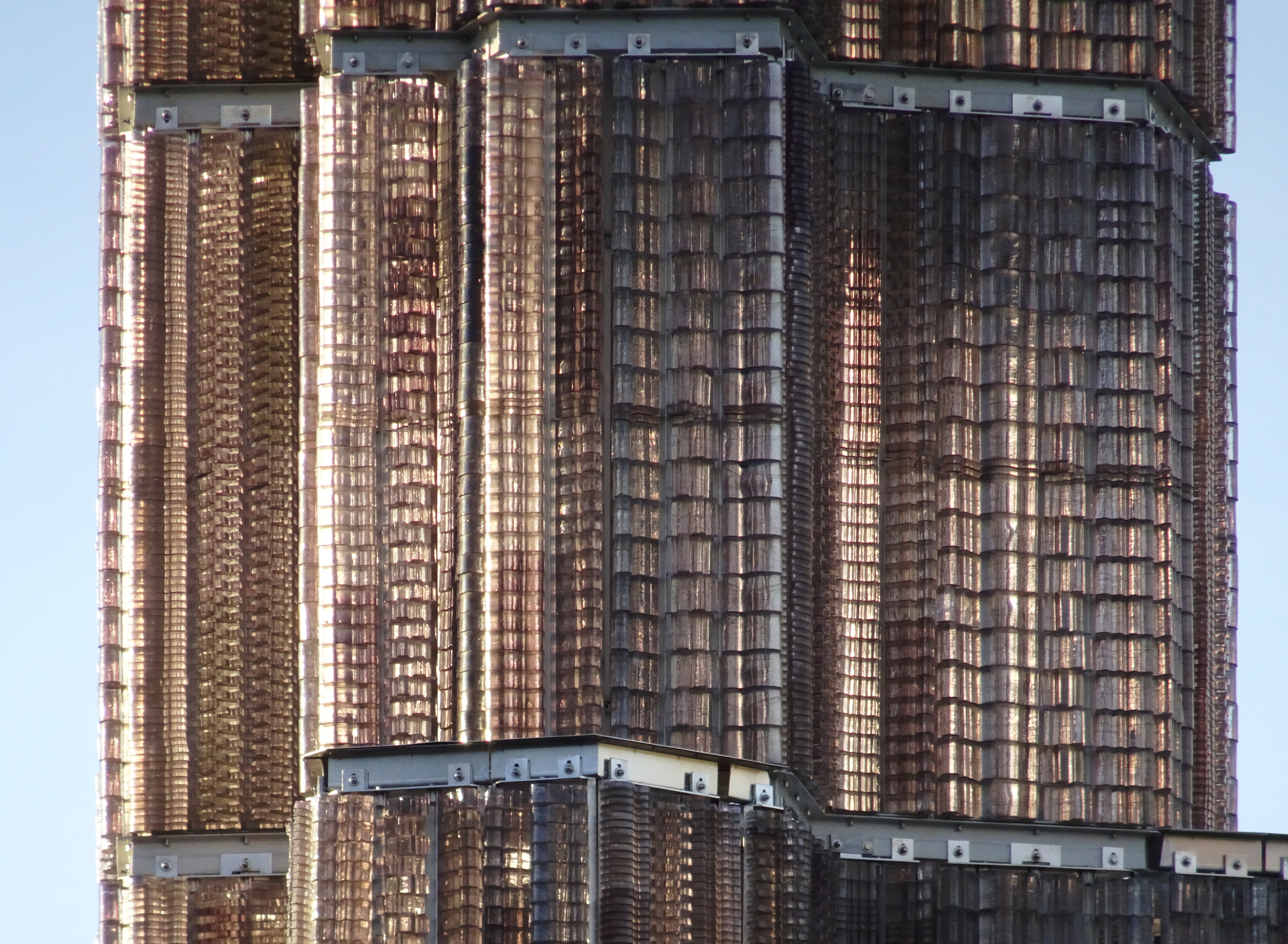 Glasobelisken, Sergels torg, efter renovering